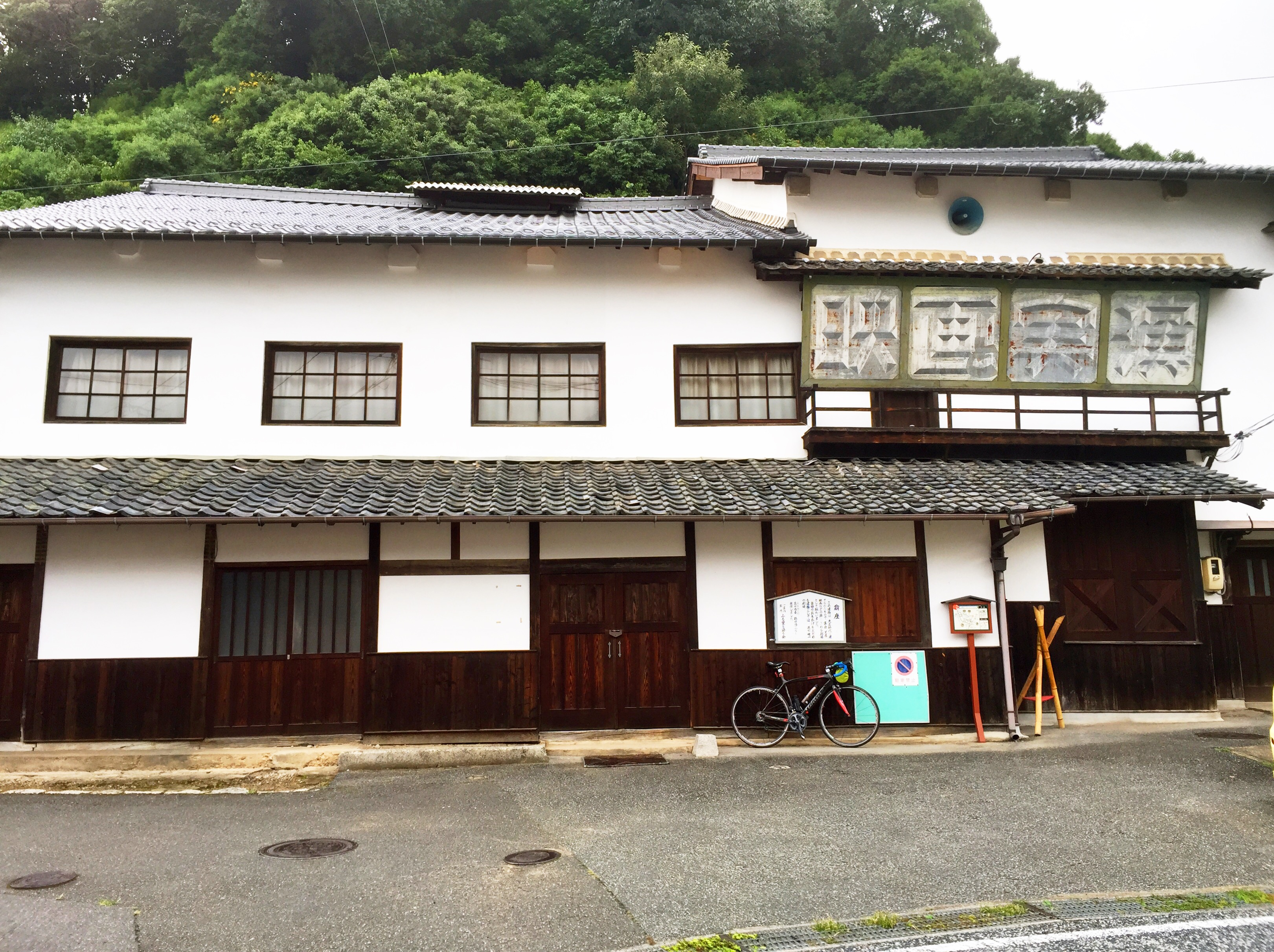 広島県府中市上下町の木造芝居小屋の翁座